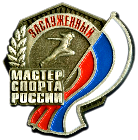 Образец знака к почётному спортивному званию «Заслуженный мастер спорта России» (с 2007 года).